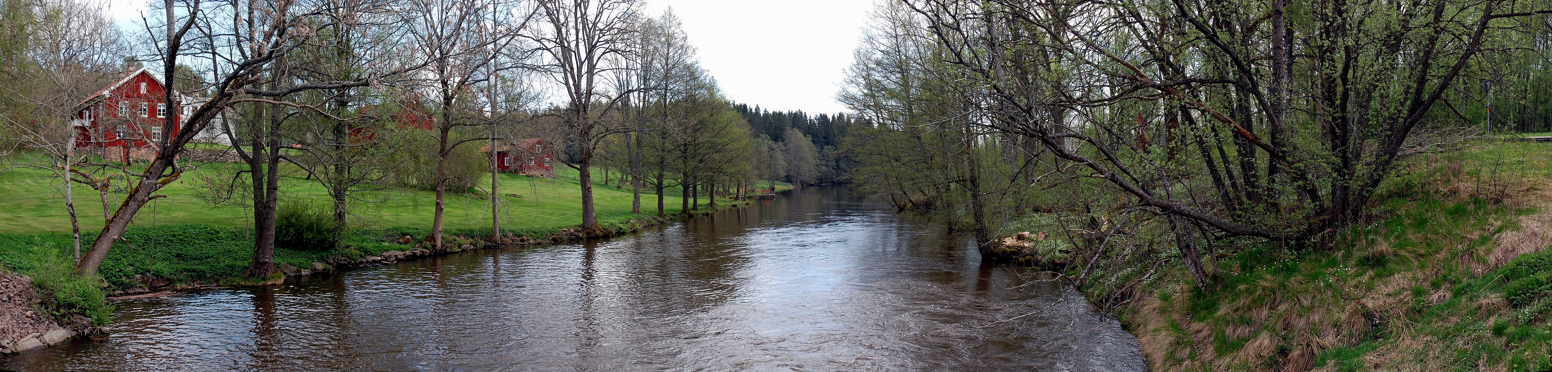 Alsterån vid Gunnerud